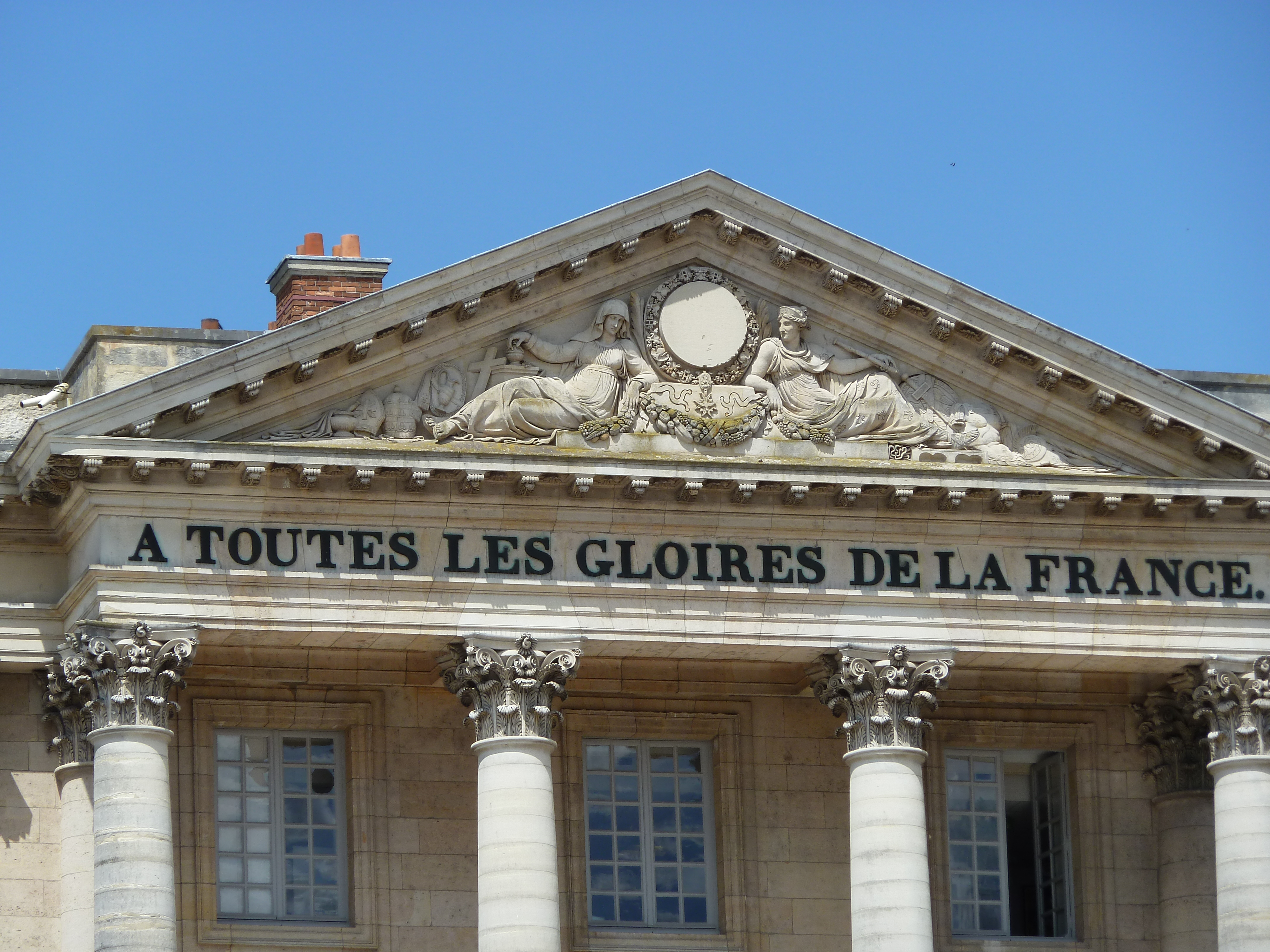 Musée national du Château de Versailles fronton "A TOUTES LES GLOIRES DE LA FRANCE."